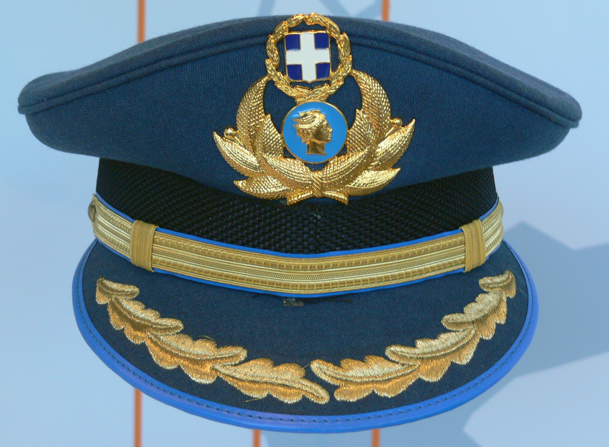 Hamburg, Deutsches Zollmuseum, Zollmütze aus Griechenland